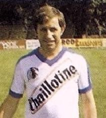 Guy Roux en 1979, 'Francia Football 80', Panini figurina n°468.